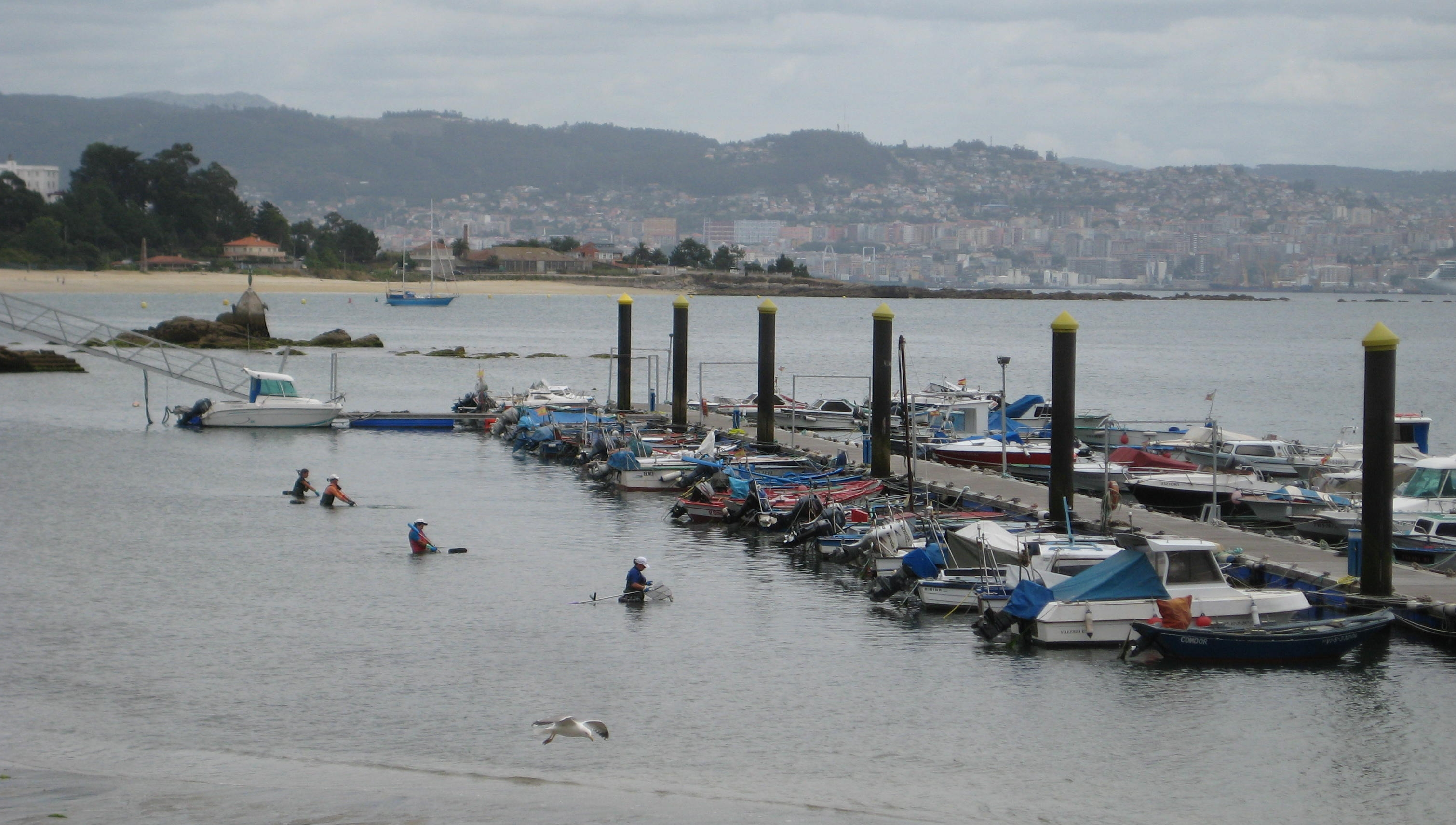 Mariscadoras en el Puerto de Cangas (Morrazo, Pontevedra). Al fondo, Vigo.